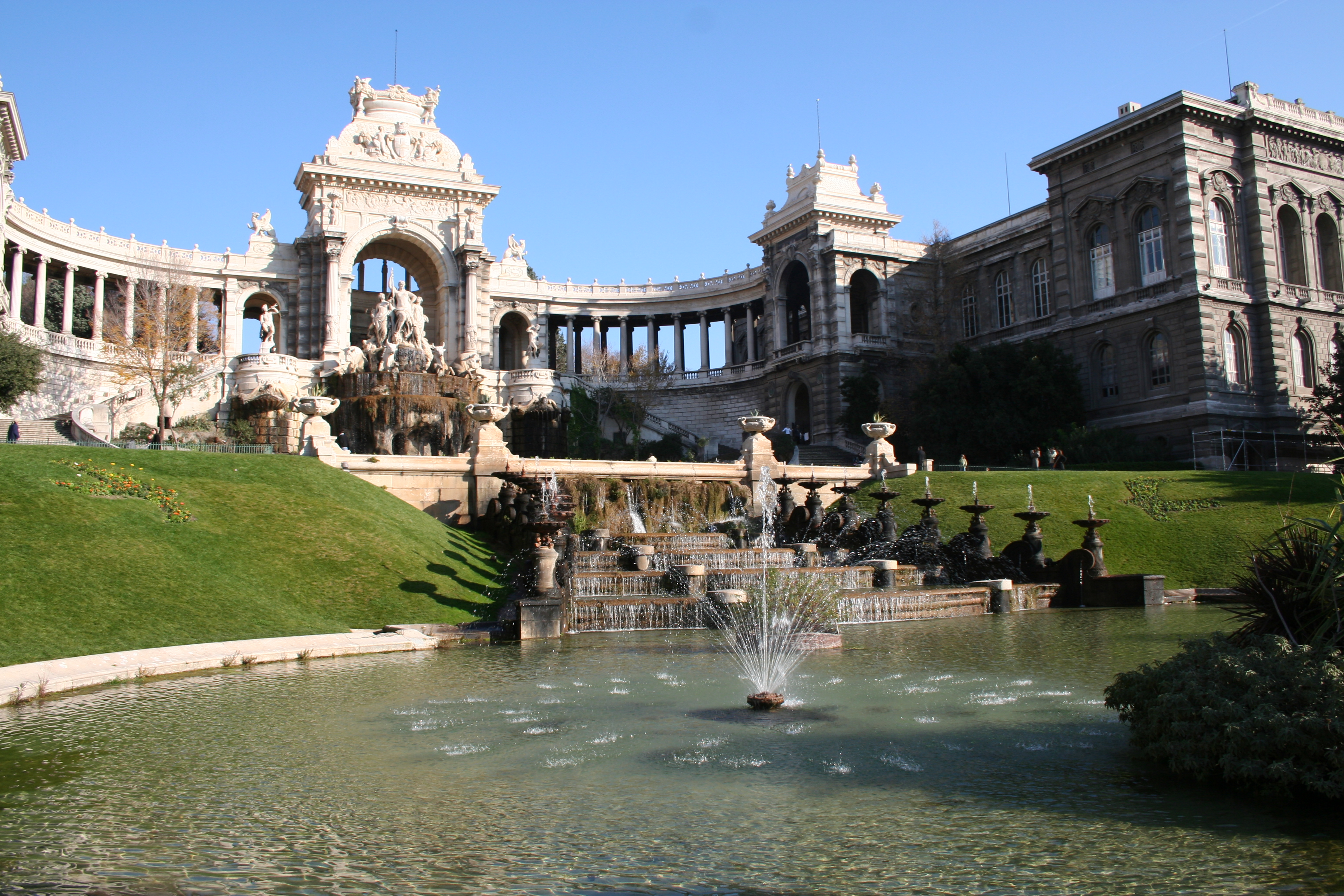 Palais Longchamp, Marseille (France).